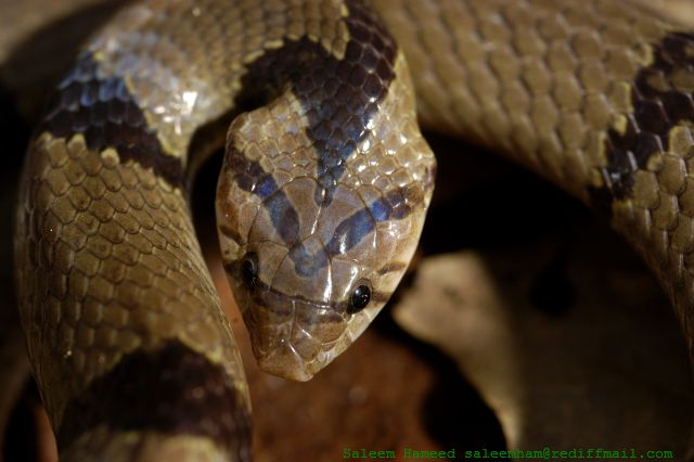 Common Kukri Oligodon arnensis snake, India